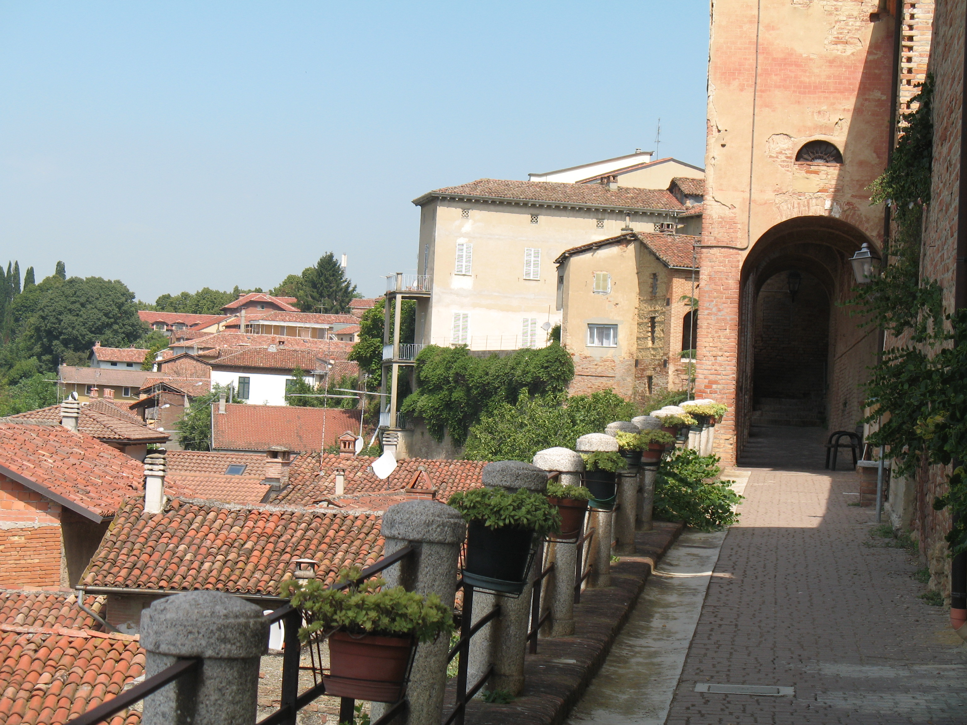 Lo Spalto, Fubine, Alessandria, Piemonte, Italia